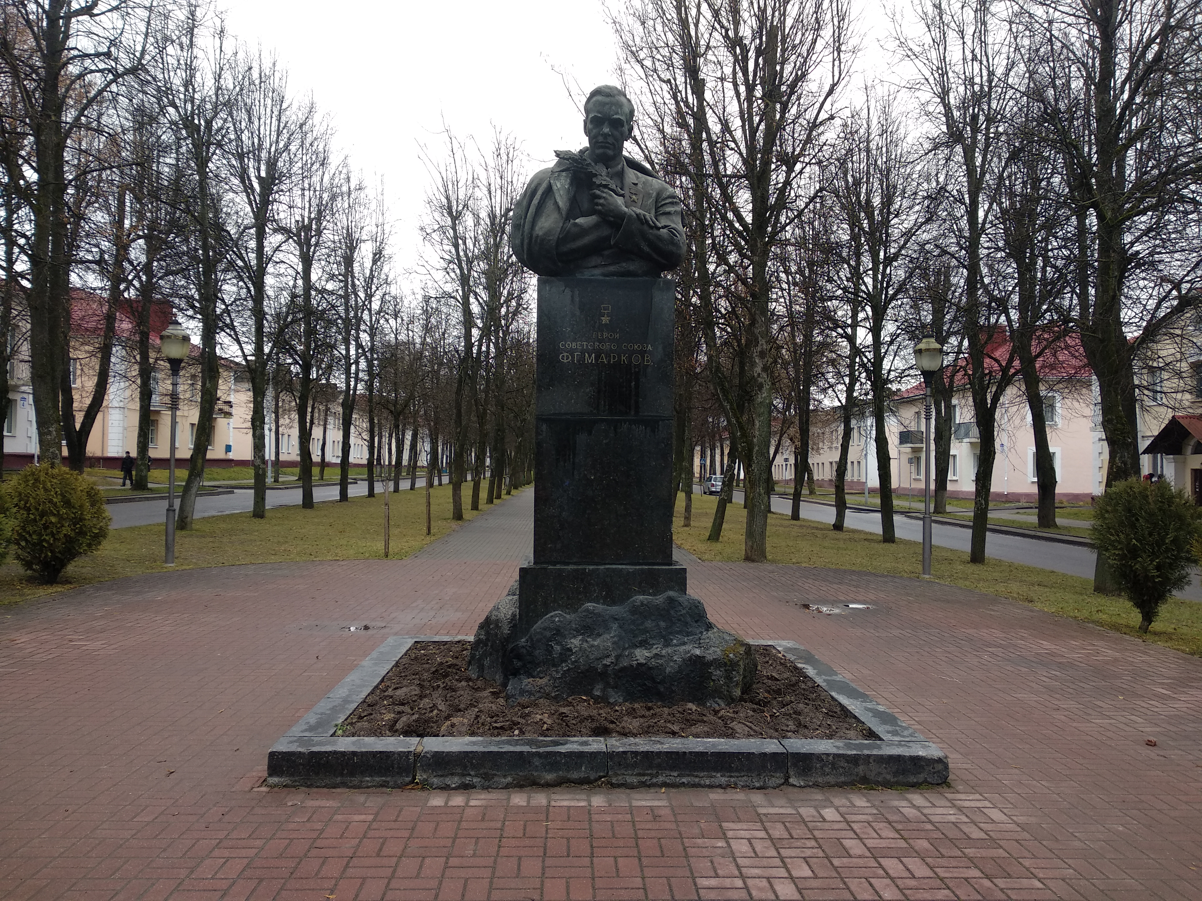 Maladzechna, Belarus